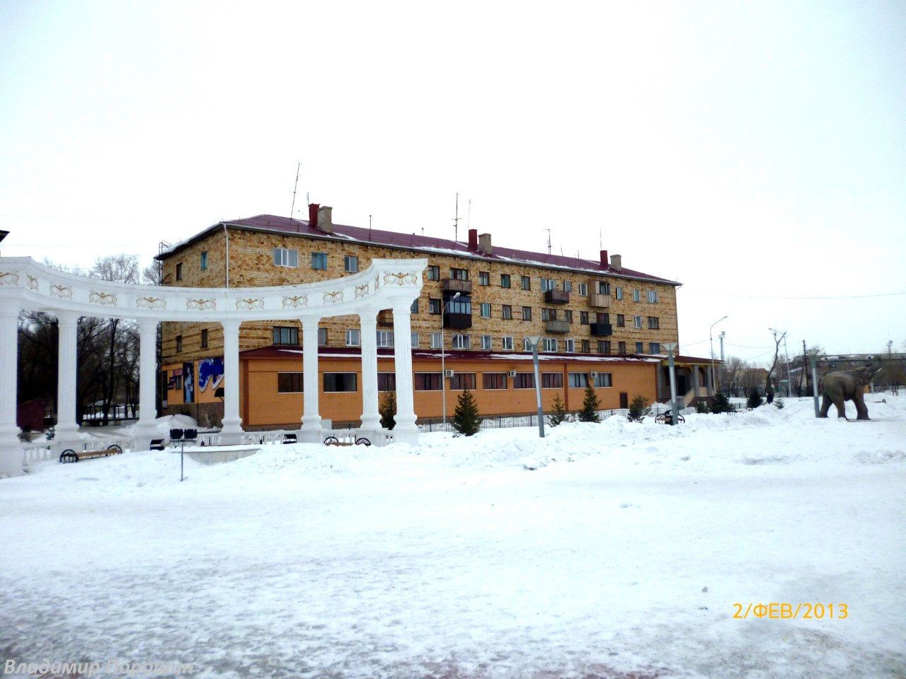 Прогулка с фотоаппаратом по родному городу